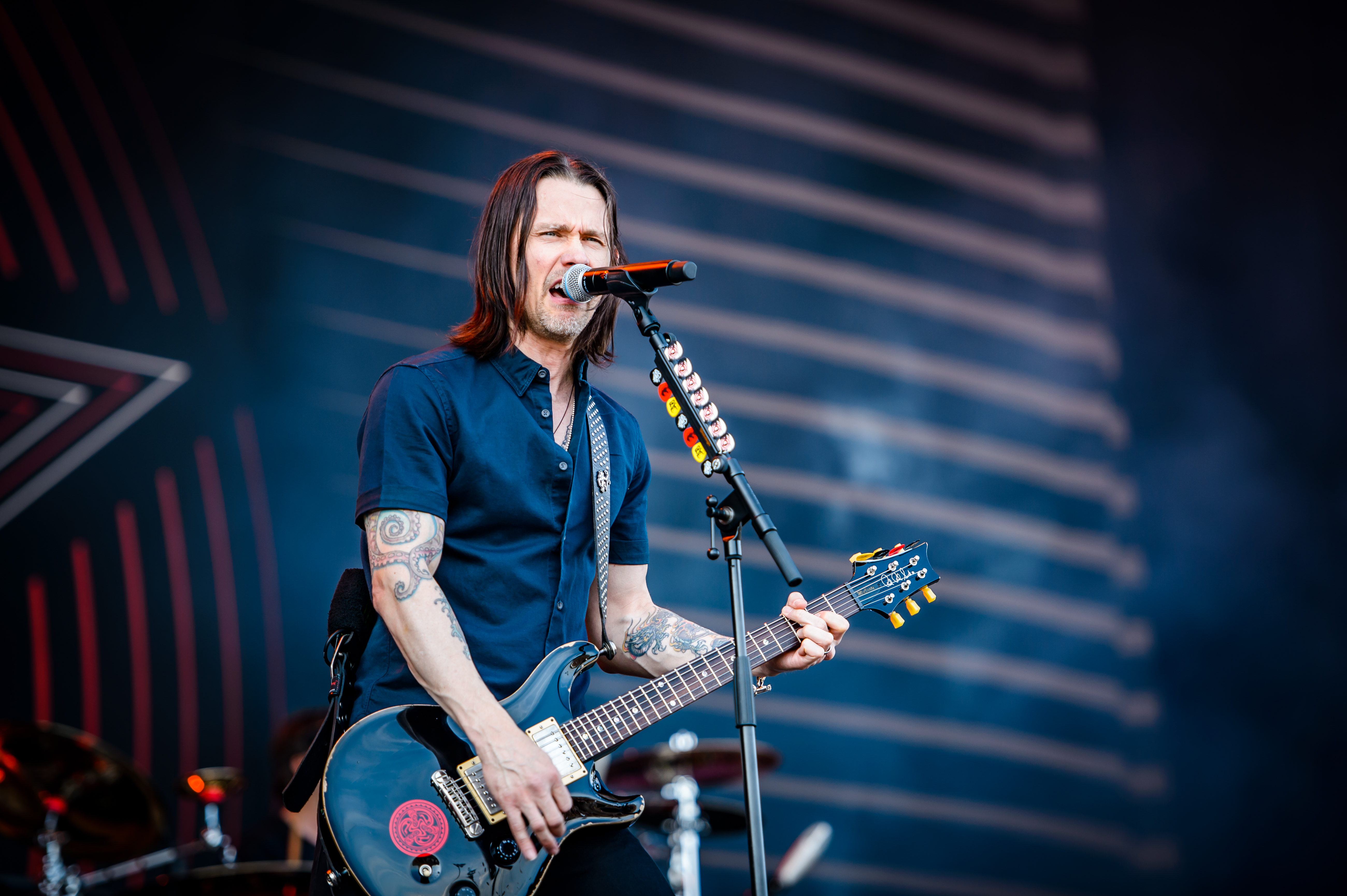 'Rock im Park 2017; Nürnberg': 'Alter Bridge'